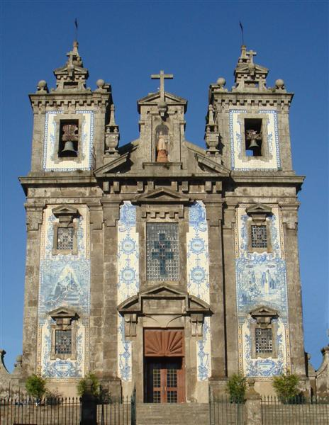 Santo Indefonso Church in Porto, Portugal; azulejos by Jorge Colaço